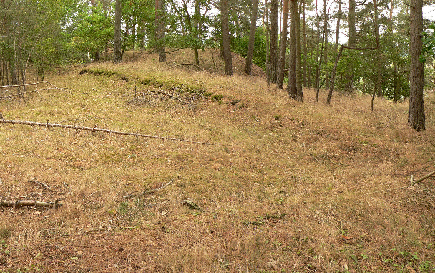 Rand der Grabungsfläche auf dem Fundplatz Pevestorf